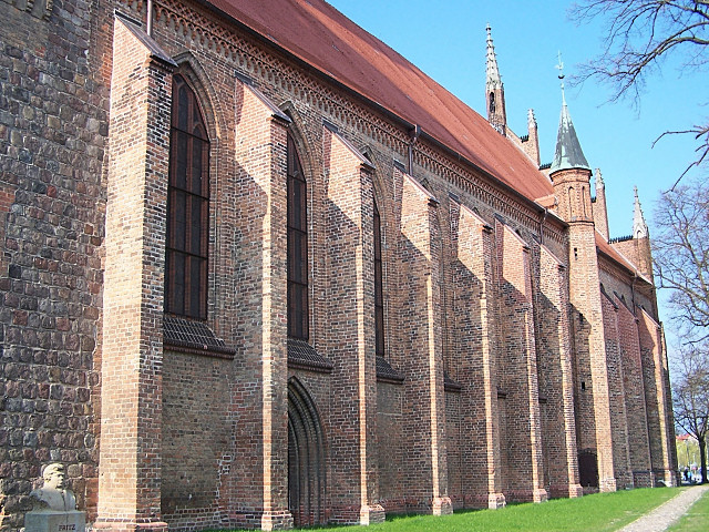 Kirche in Friedland, Mecklenburg-Vorpommern